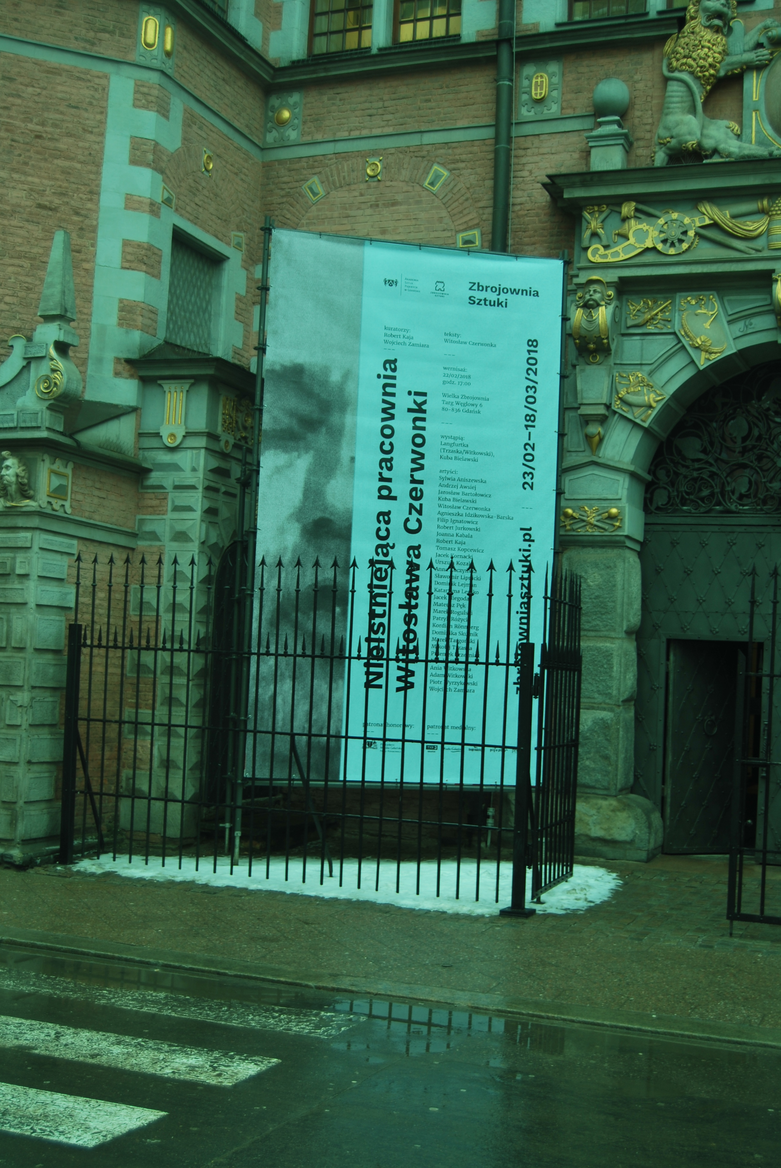 Plakat wystawy uczniów prof. Witosława Czerwonki, ASP w Gdańsku, luty-marzec 2018.